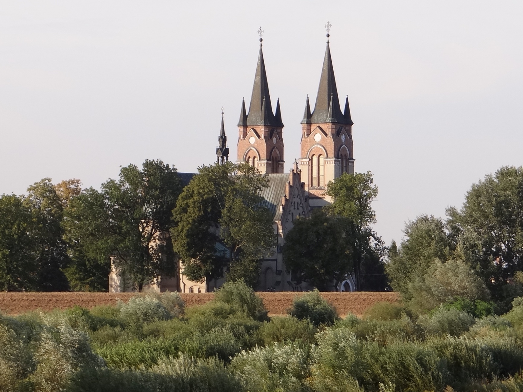 Kościół w Otfinowie